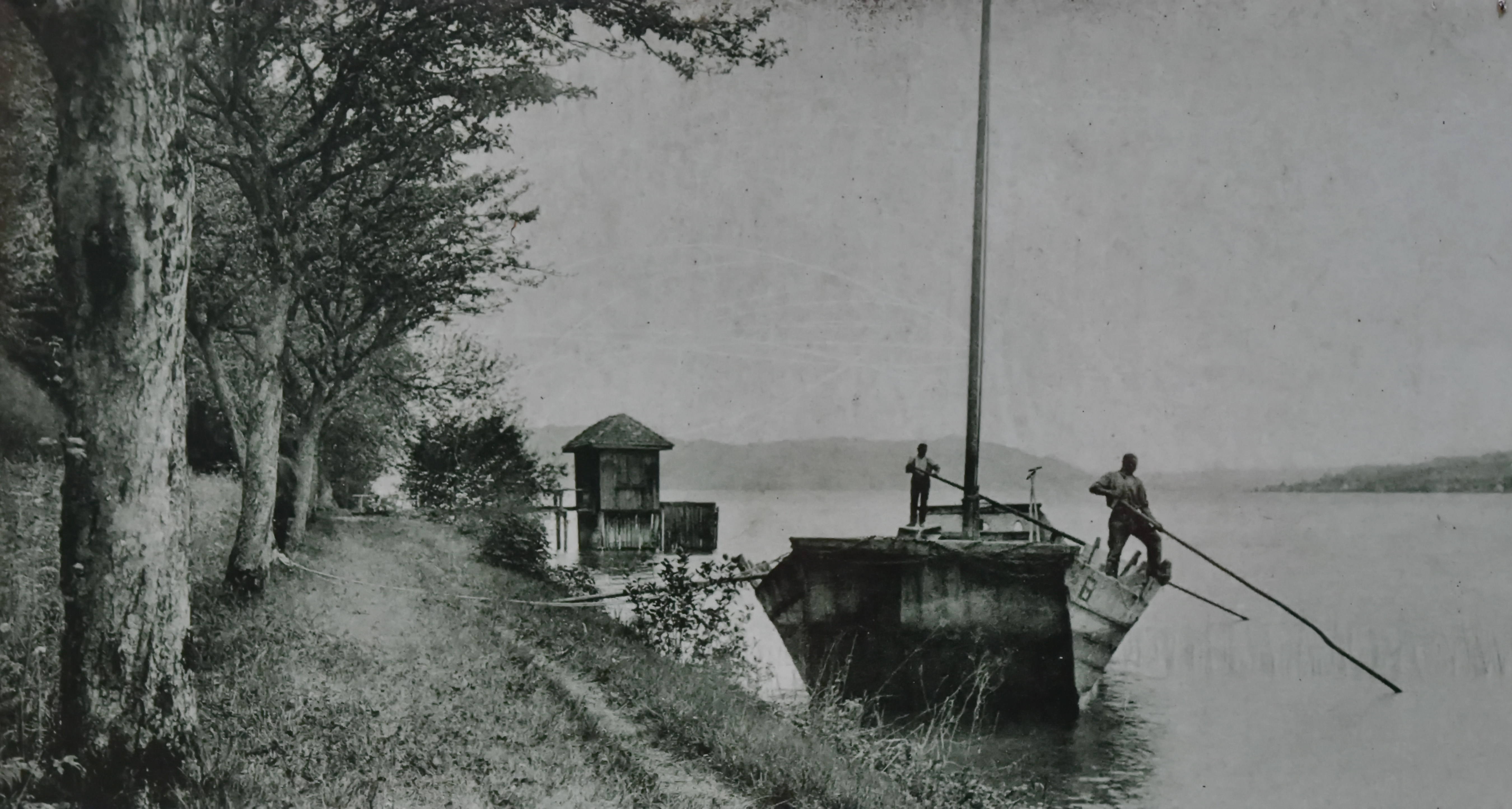 Au peninsula in Au on Zürichsee in Switzerland